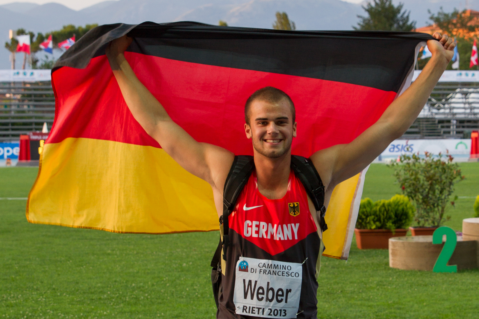 Julian Weber nach dem Sieg bei den U20 Europameisterschaften 2013 in Rieti